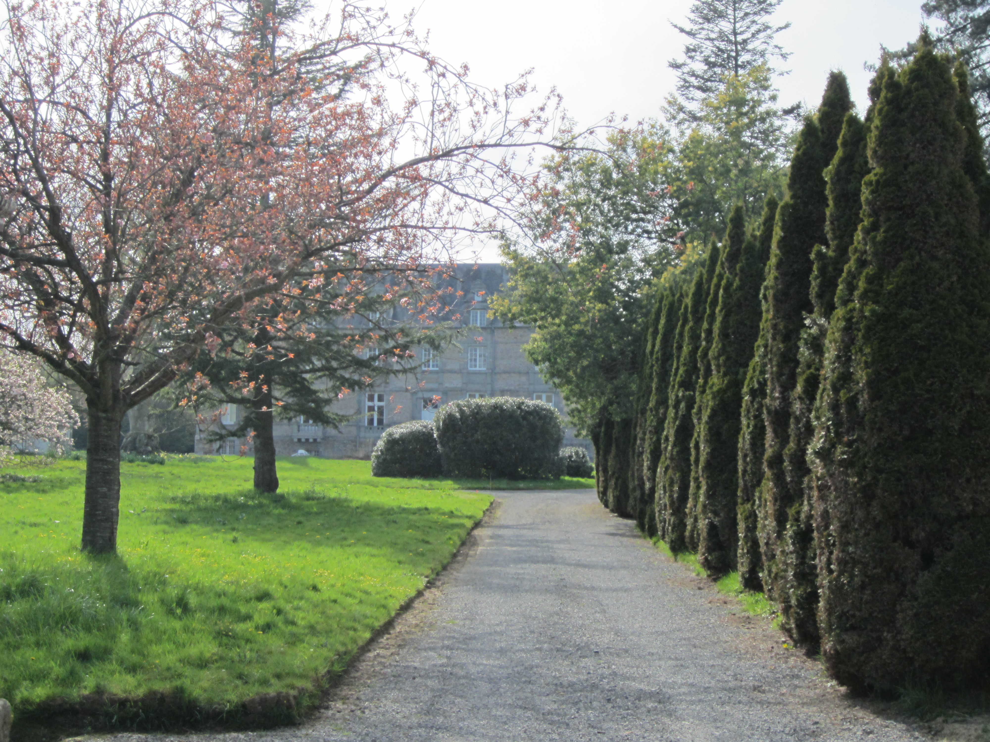 nouveau château de Saint-Pierre-Langers, Manche